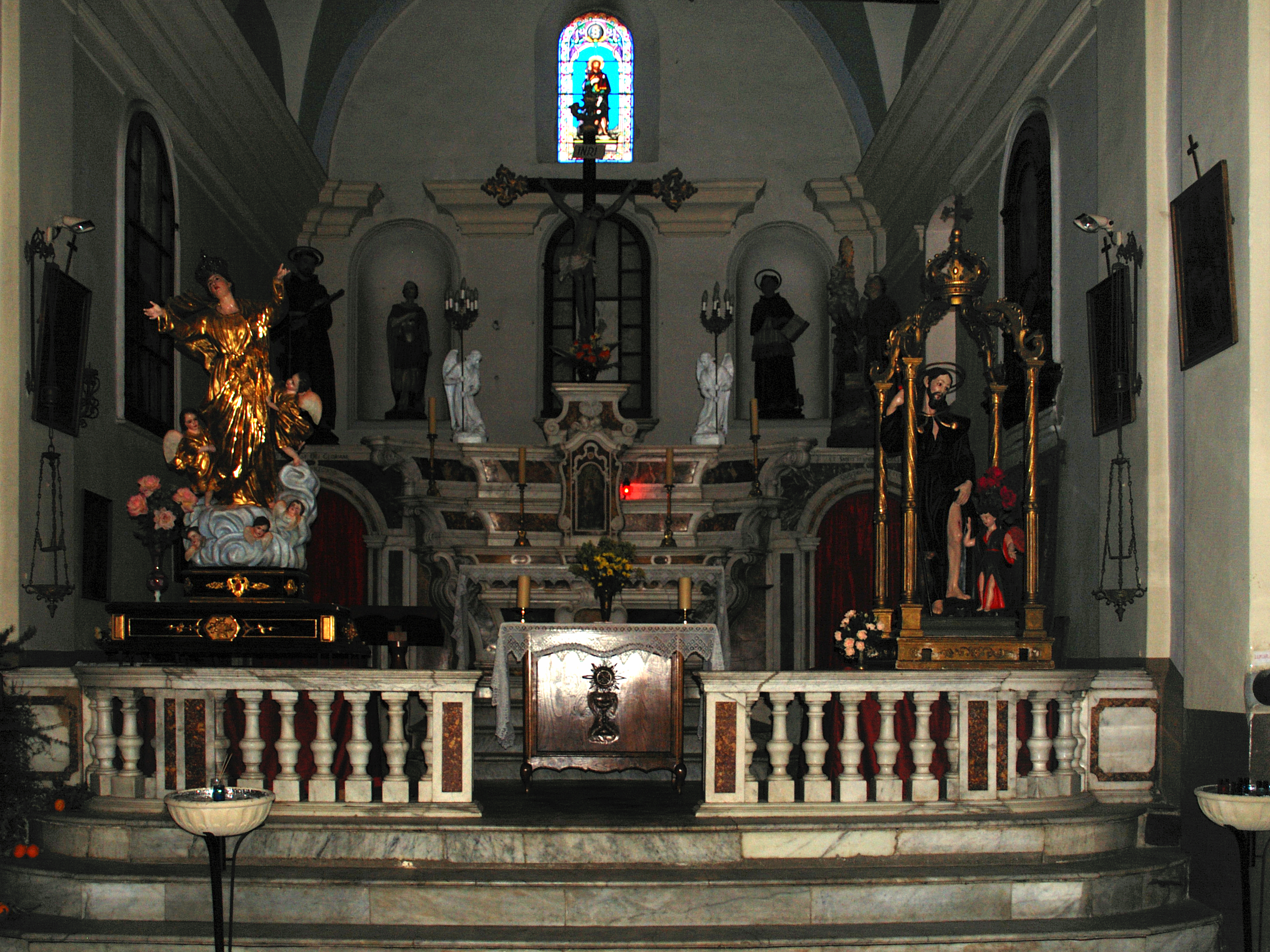 Zilia, Balagne (Corse) - Chœur de l'église paroissiale San Roccu